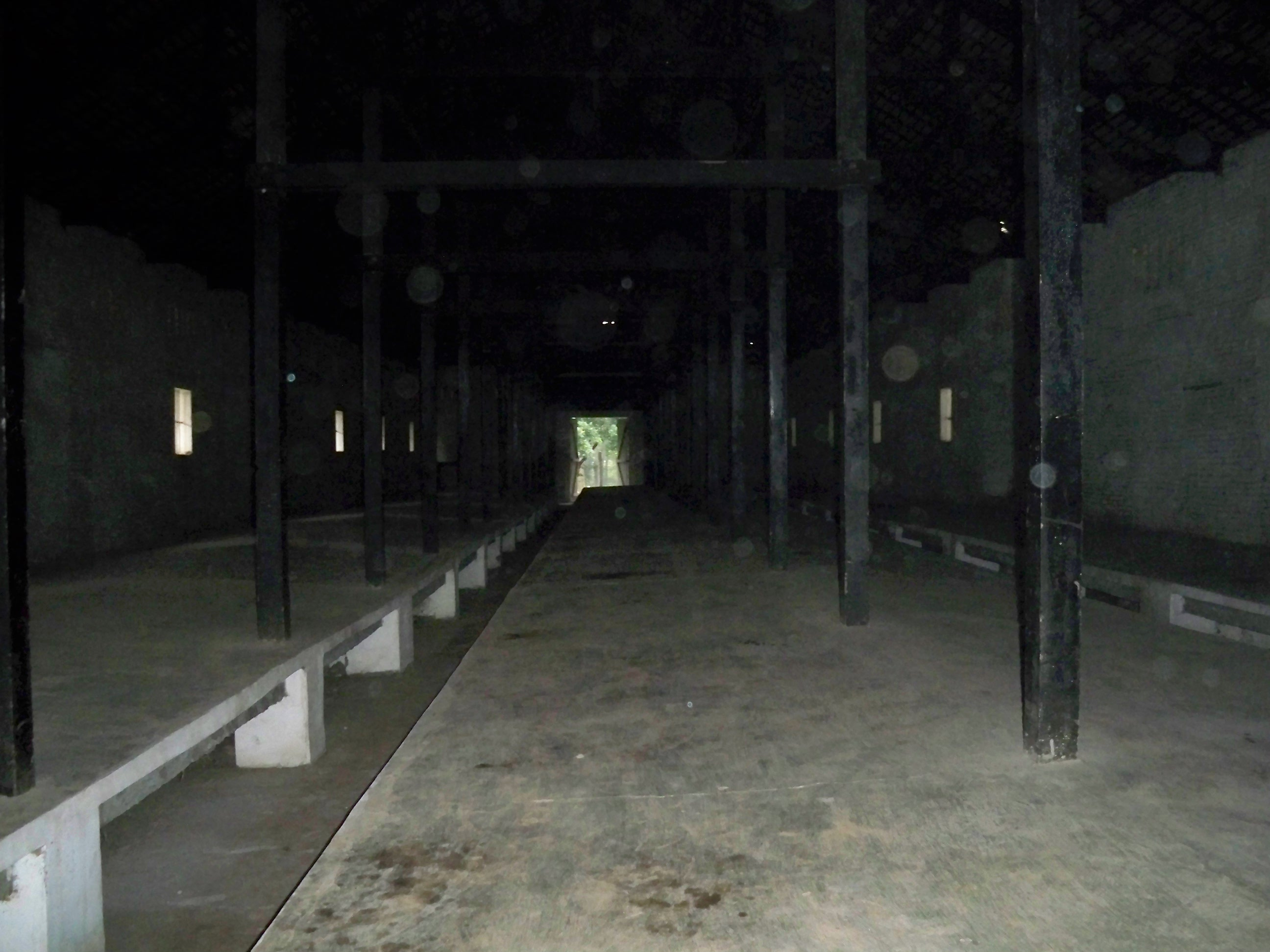 Phòng biệt giam nhà tù Phú Lợi - Phan Minh Châu chụp tại nhà tù Phú Lợi nhân chuyến đi tham quan thực tế học sinh trường Đoàn Thị Điểm